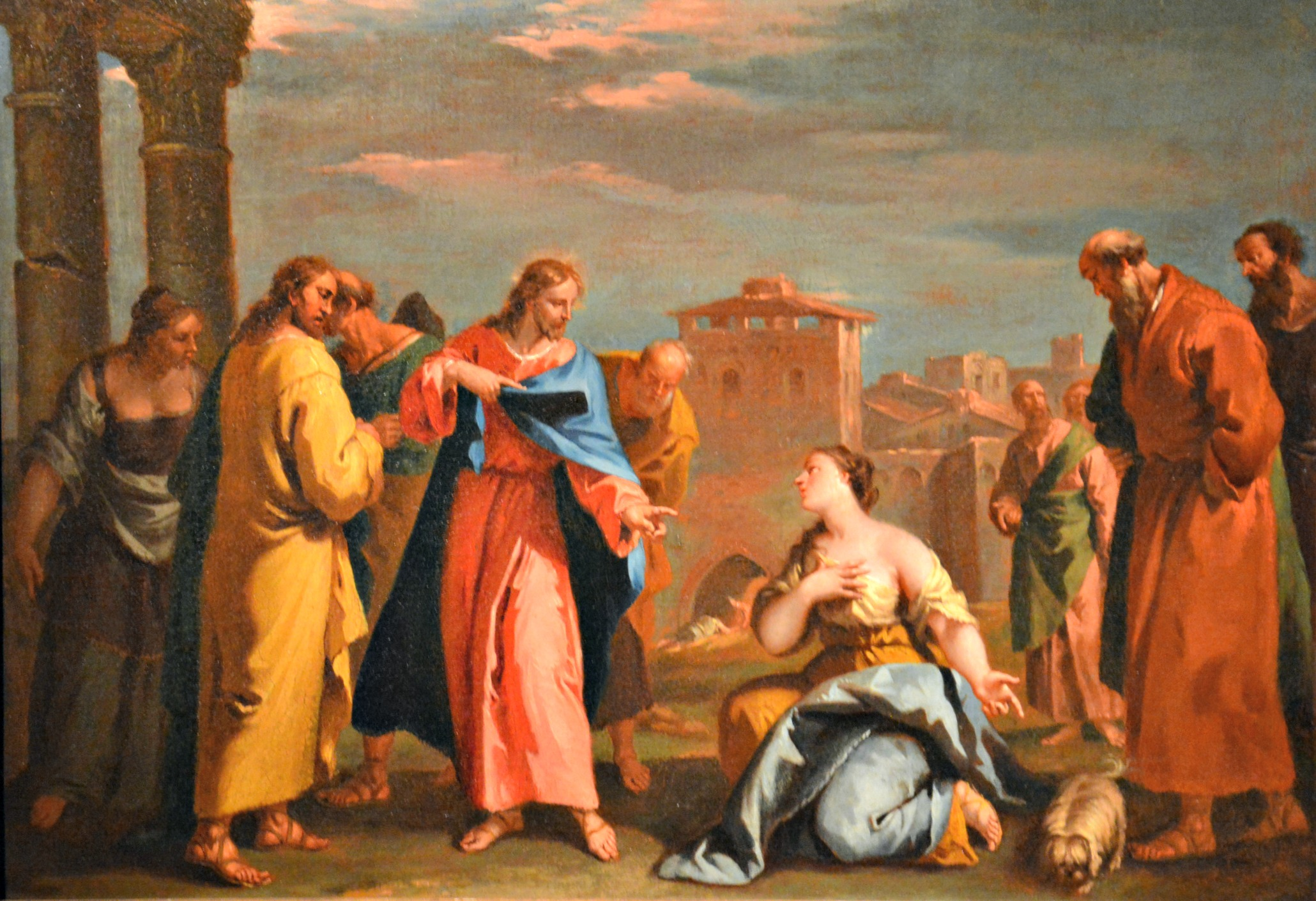 Vedi titolo